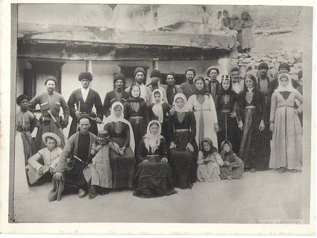 из башенного поселения "Фуртоуг"... Род Тейпа Ахриевых... Фото - 1920-х годов...